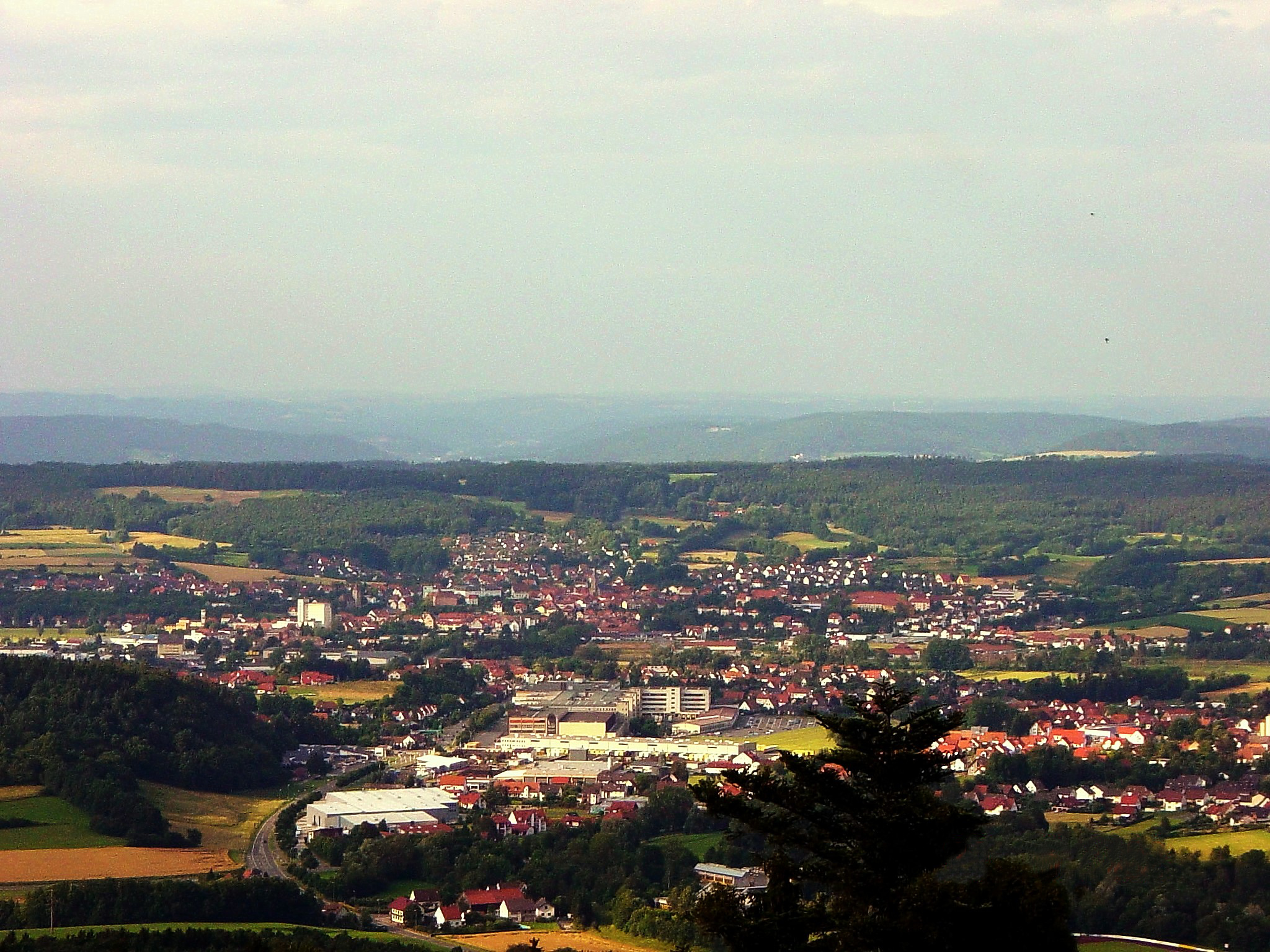 Alten- und Burgkunstadt